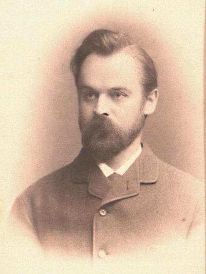 Ruge, Georg (Hermann)